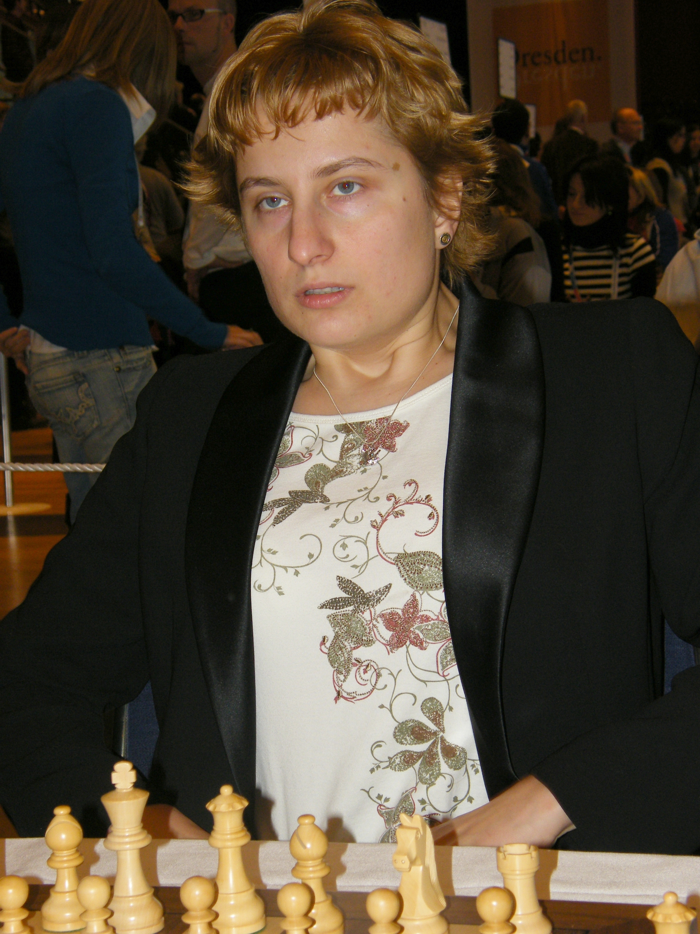 Katerina Rohonjan bei der 38. Schacholympiade in Dresden 2008